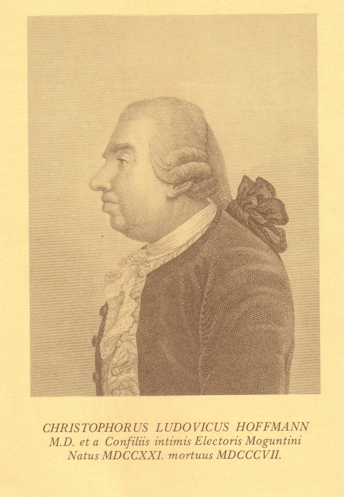 Porträt von Christoph Ludwig Hoffmann (1721-1807)